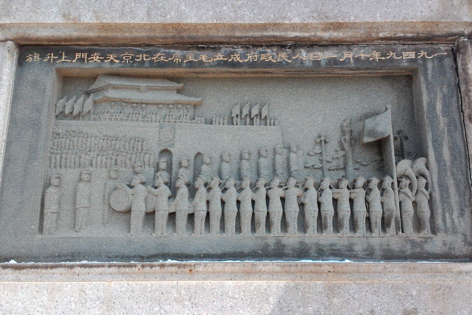 一九四九年十月一日人民政府成立毛主席在北京天安門上升旗,福建省廈門市集美區集美街道潯江社區